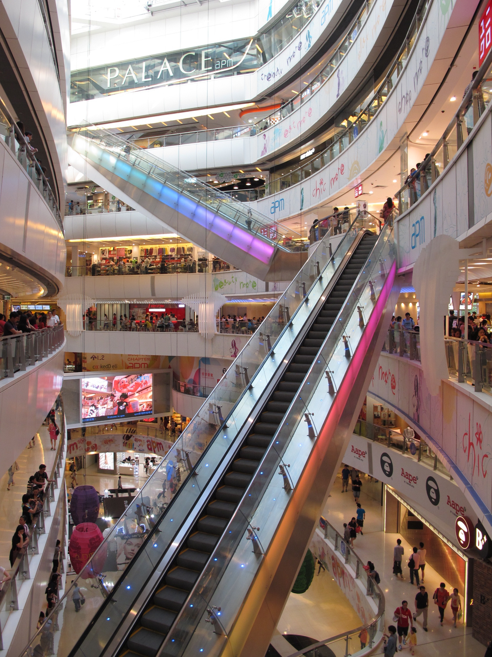 apm Main Void